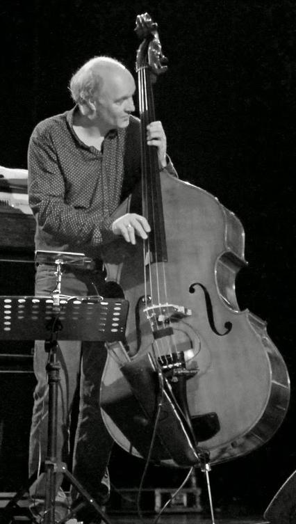 Klavs Hovman auf dem St. Ingberter Jazzfestival